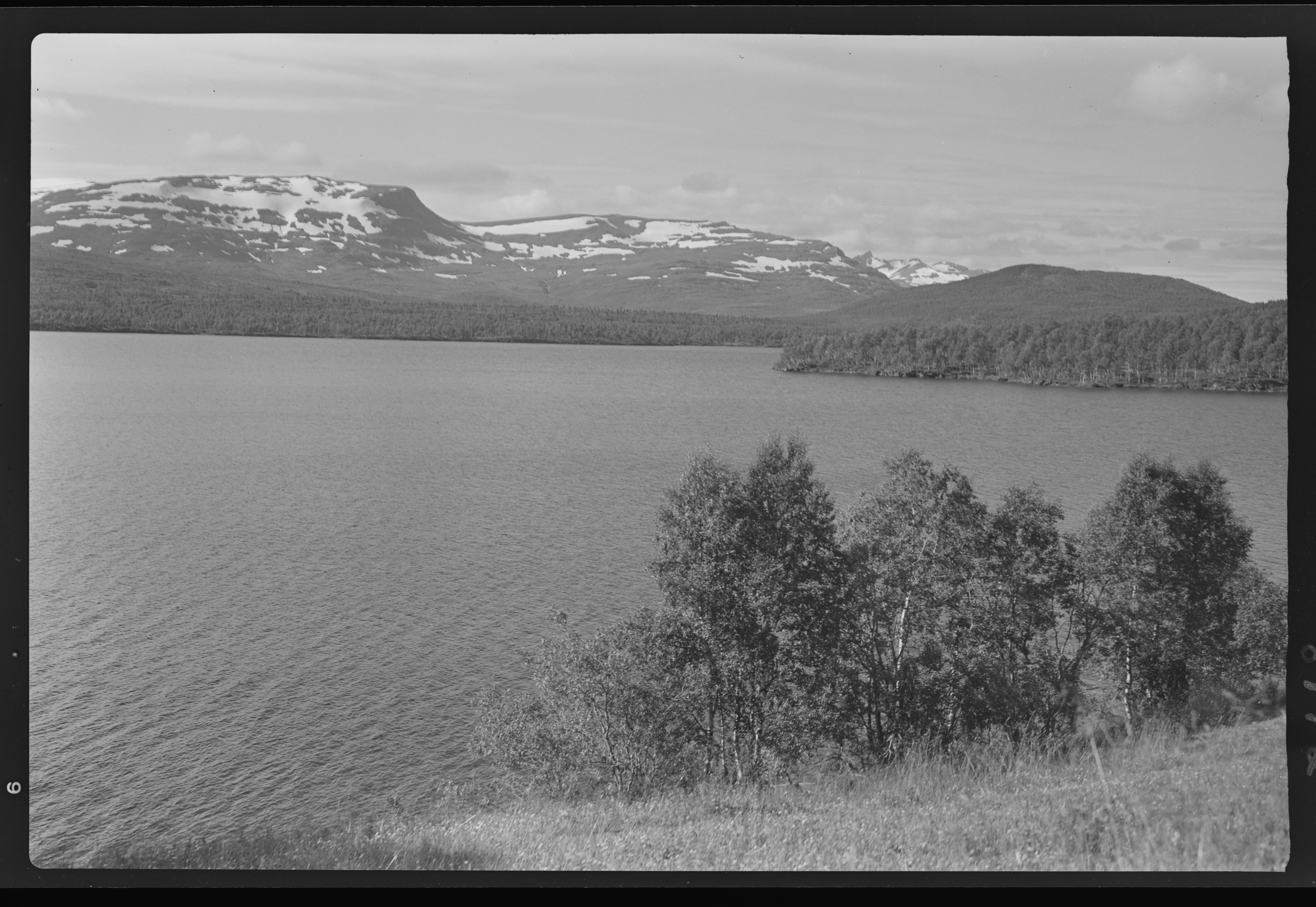 Bildet er hentet fra Nasjonalbibliotekets bildesamling. Anmerkninger til bildet var: Fotograf : ukjent Andsvatnet, Sørreisa, Troms